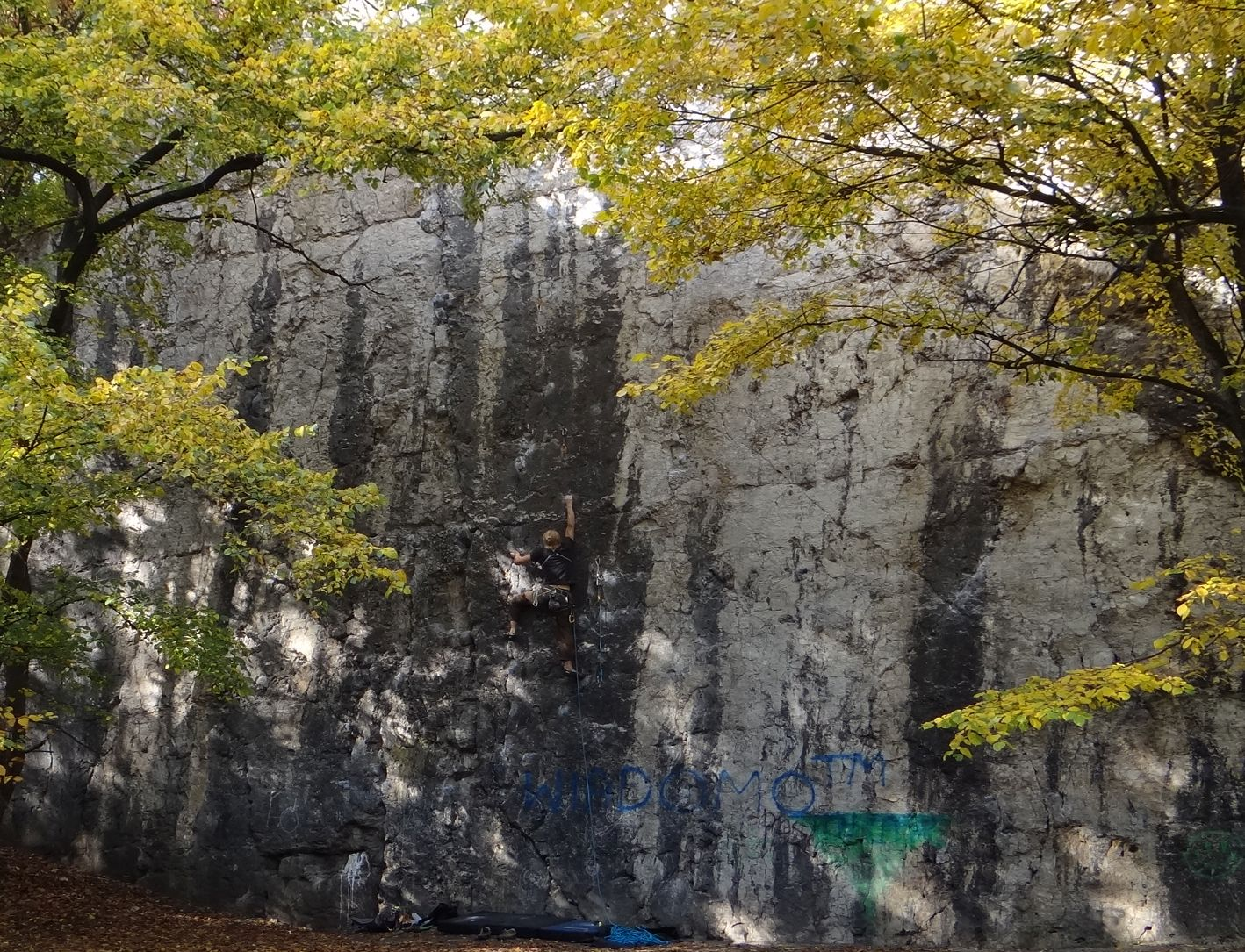 Mur skalny "Esteci" w dawnym kamieniołomie pod św. Benedyktem na Krzemionkach Podgórskich w Krakowie